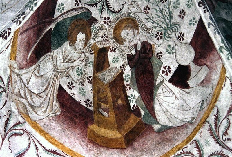 Vordingborg Vor Frue Kirke i Danmark. Korhvælv, Bebudelsen